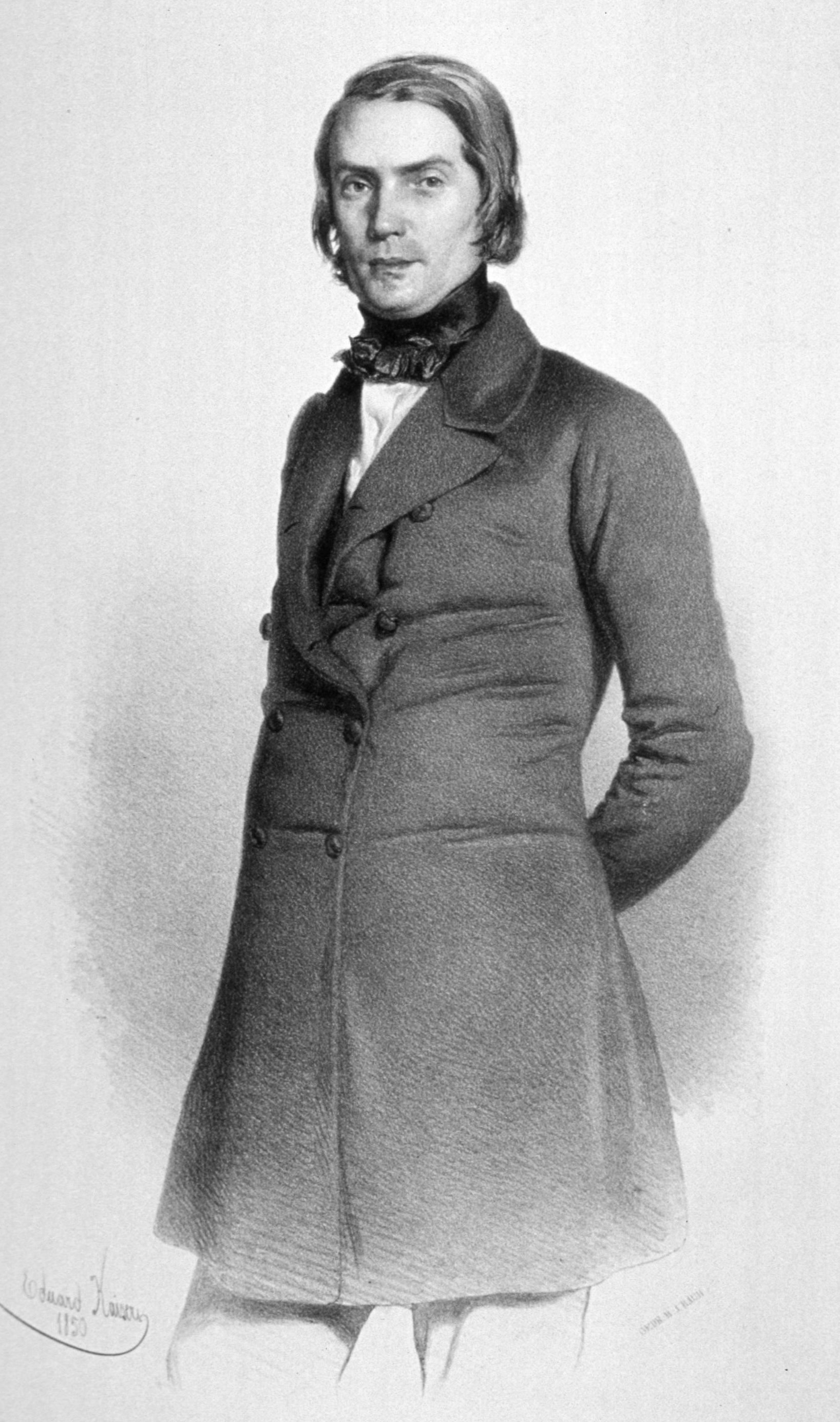 Johann Ritter von Oppolzer (4 August 1808 – 16 April 1871)